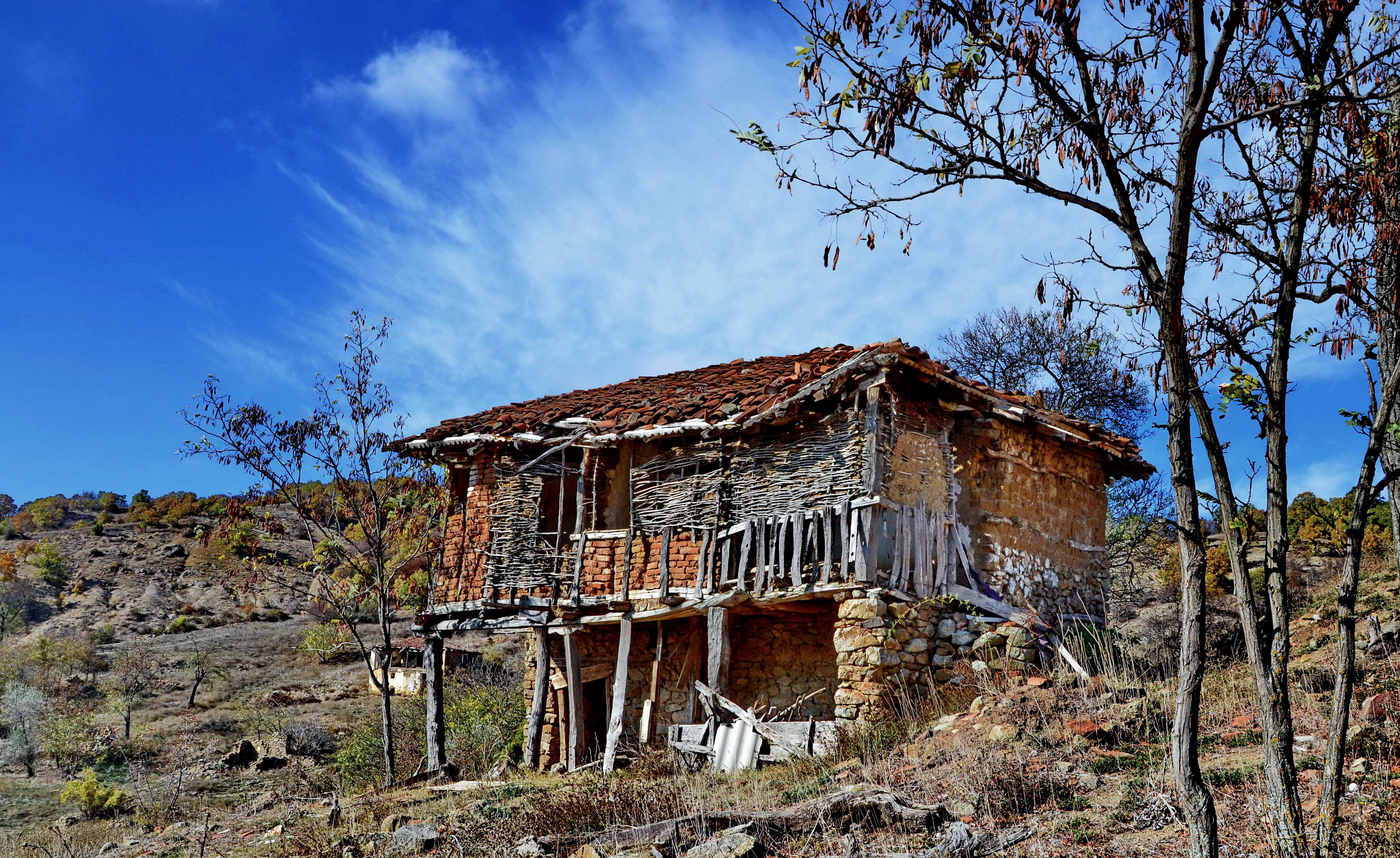 Стара куќа во с.Долна Враштица